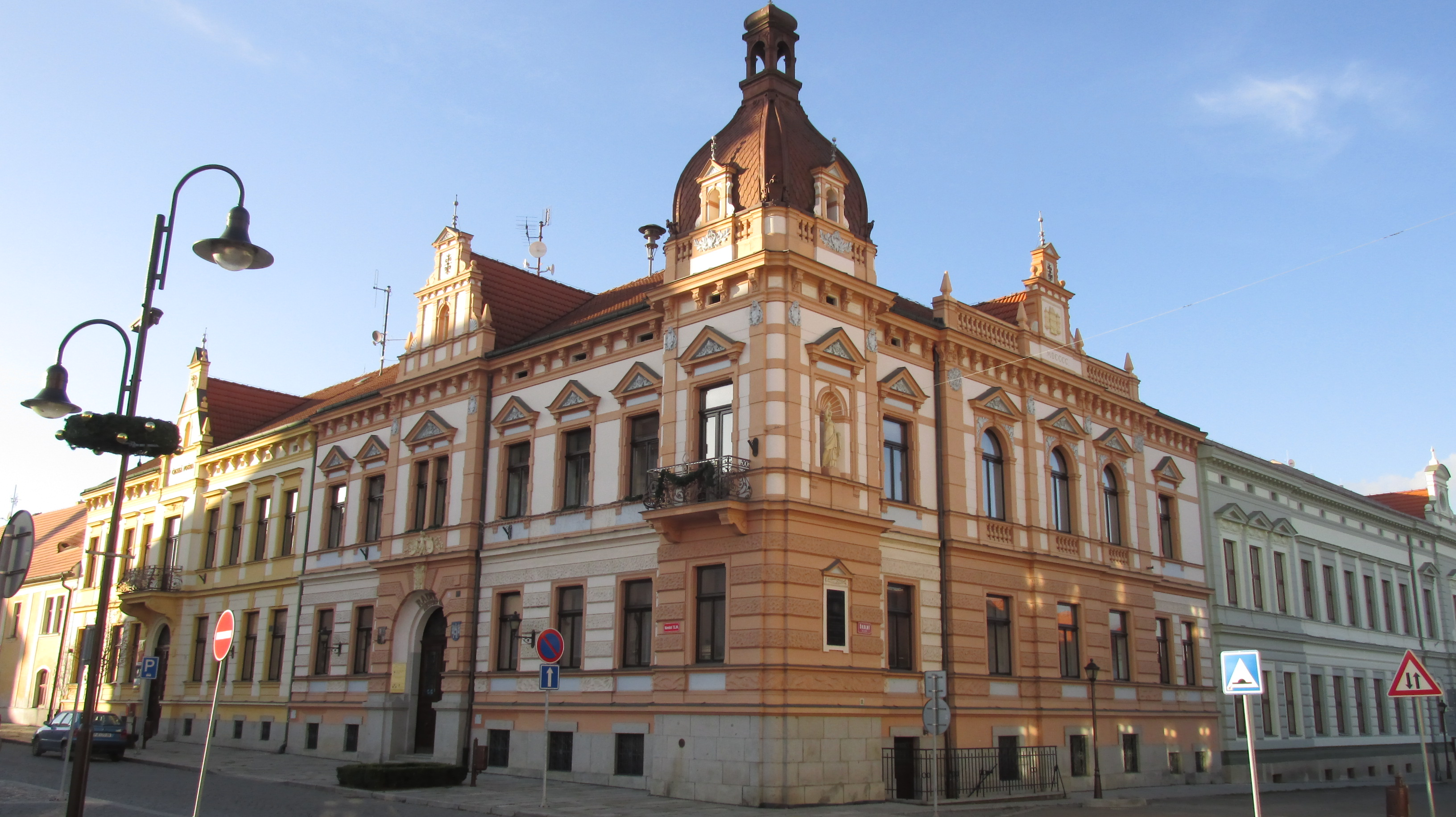 Radnice, náměstí T. G. Masaryka 1, Dobřany.